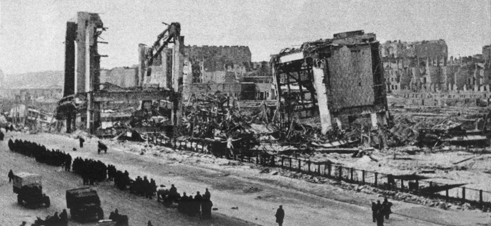 Ruiny Dworca Głównego w Warszawie w styczniu 1945